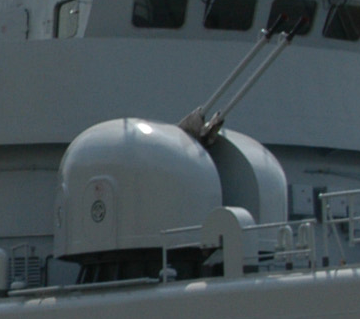 中国人民解放軍海軍の江衛型フリゲート「三明」搭載の76A型37mm連装機関砲。